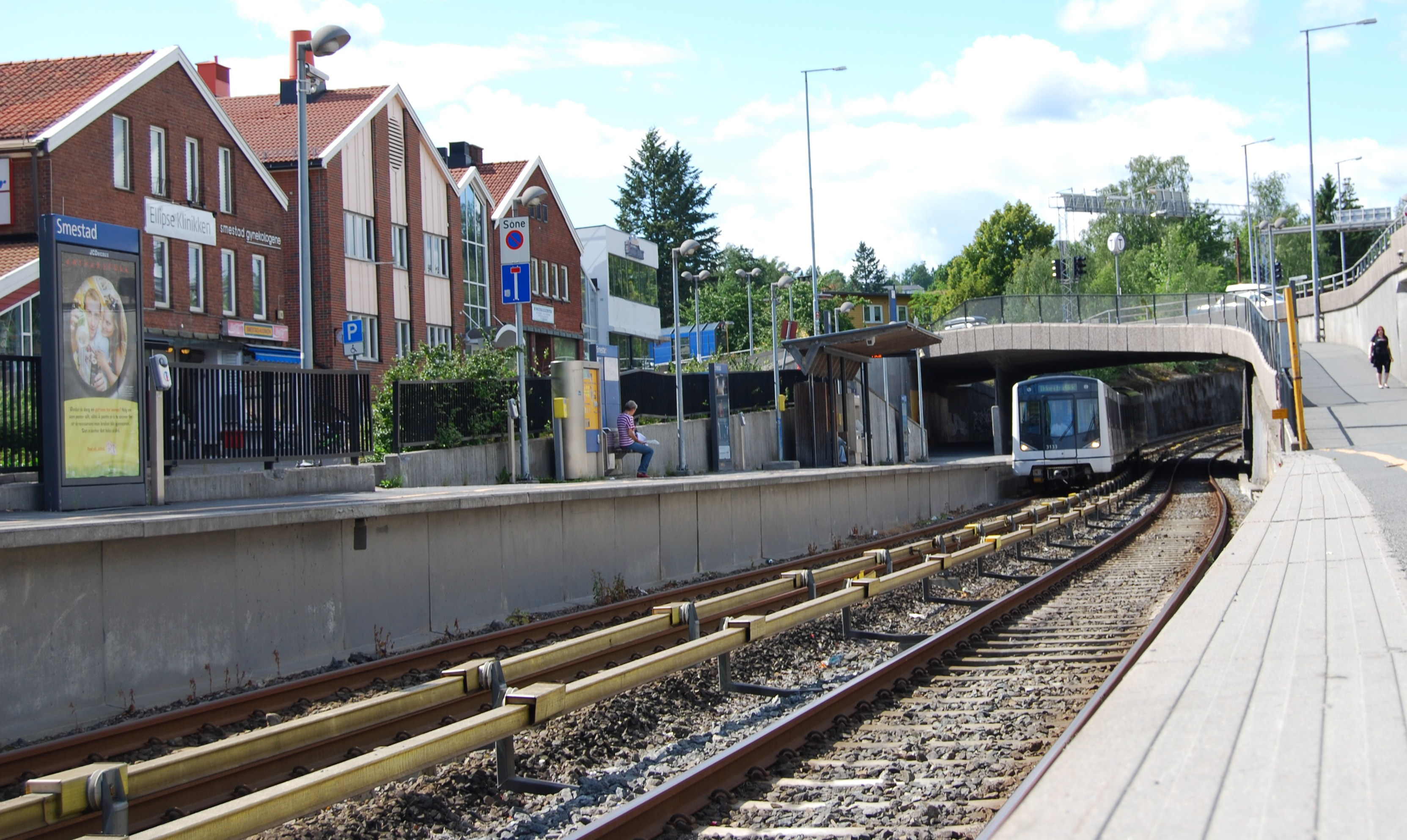 Smestad stasjon (Oslo 2009) T-bane